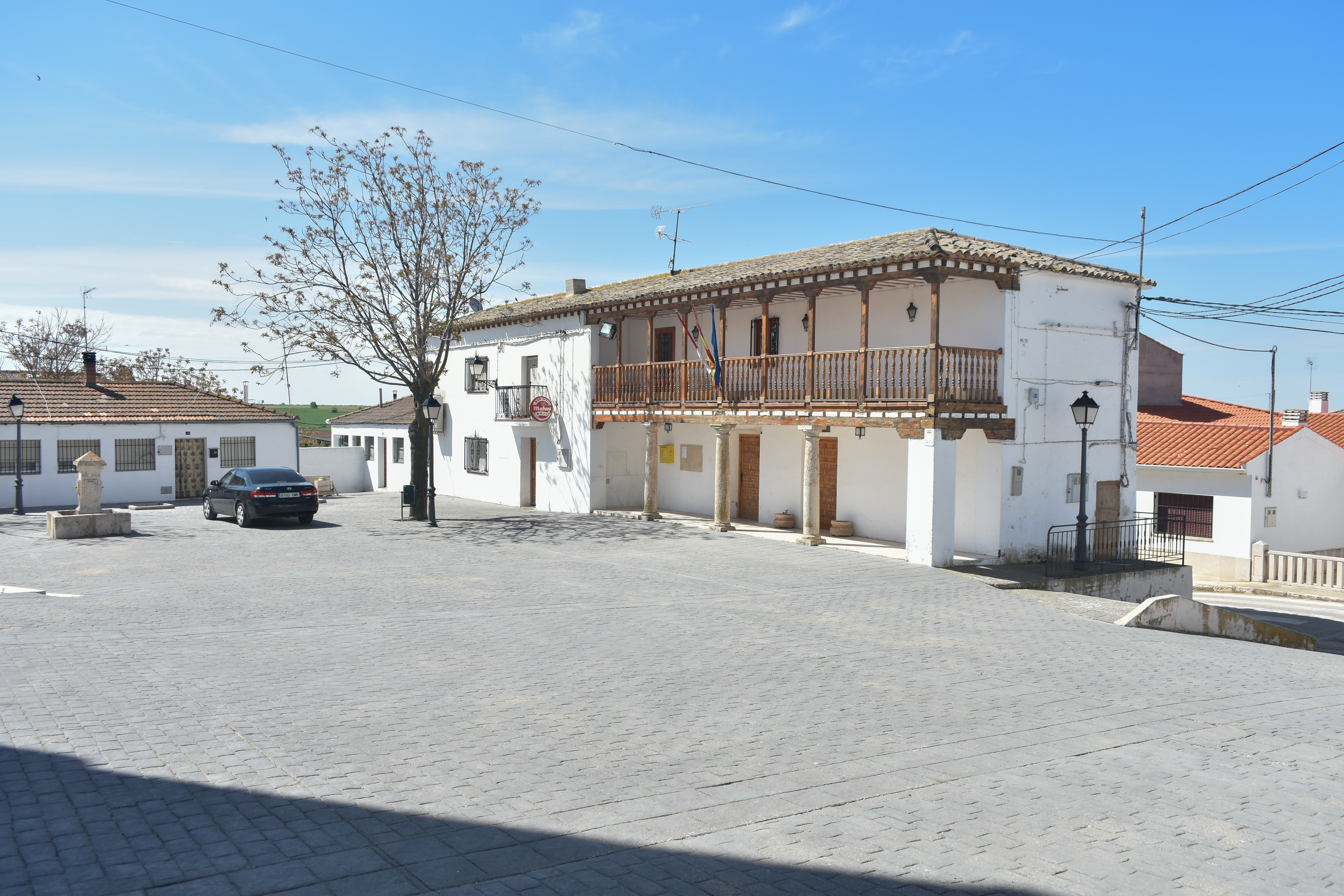 Ayuntamiento de Torrubia del Campo.